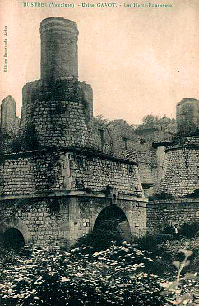 Haut fourneau de l'usine Gavot à Rustrel début XXe siècle